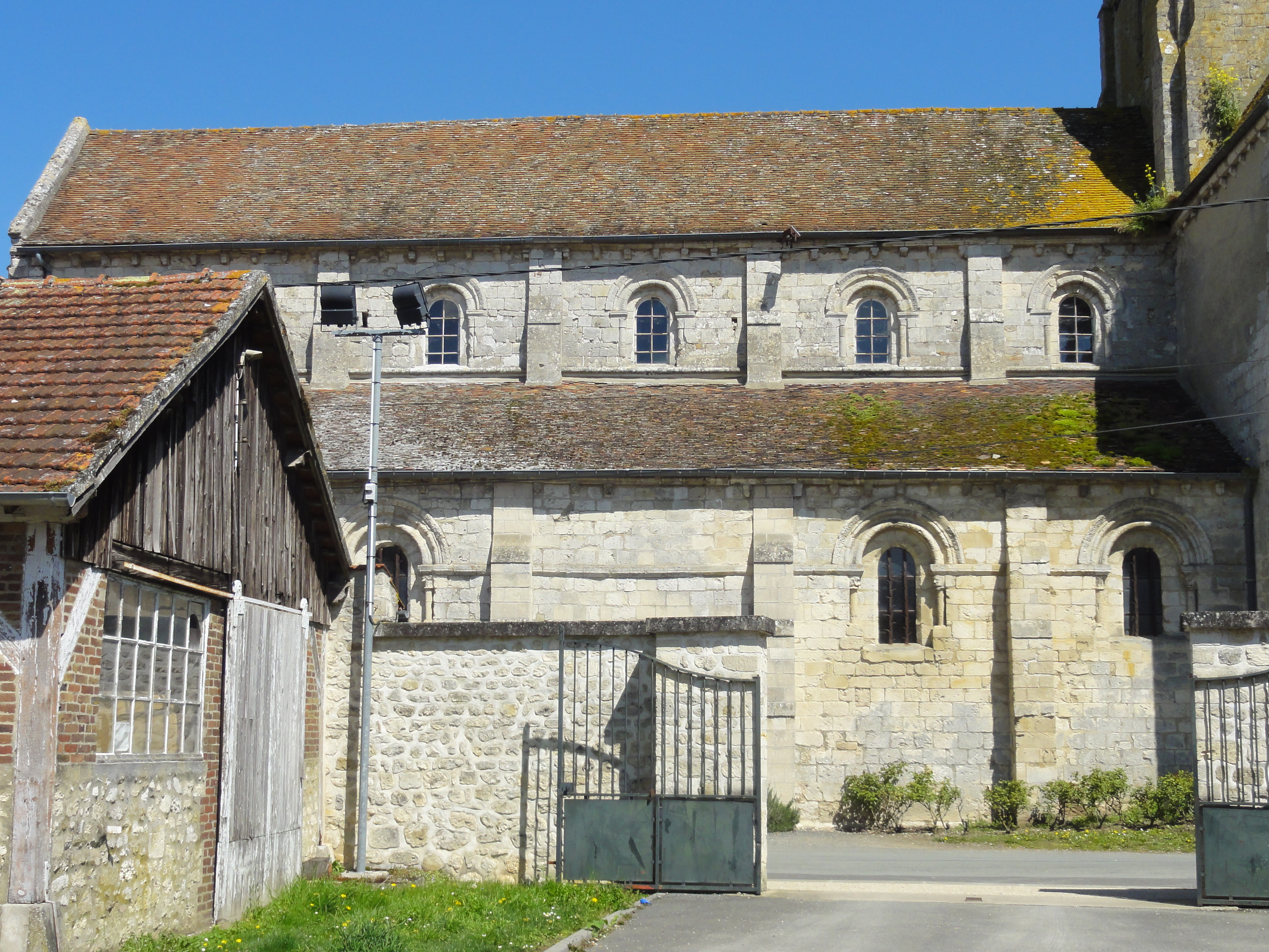 Église Notre-Dame-de-la-Nativité de Lavilletertre - voir titre.